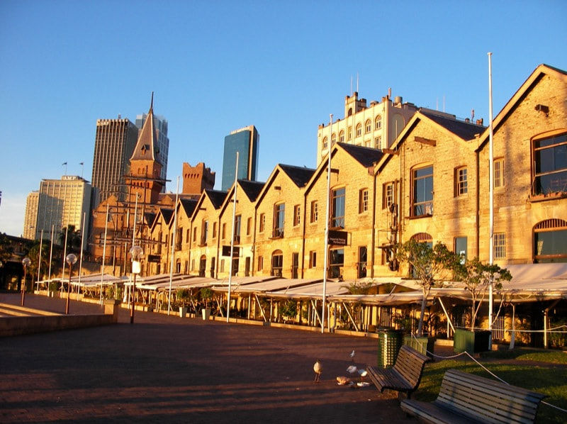 500px provided description: Sanyo Digital Camera